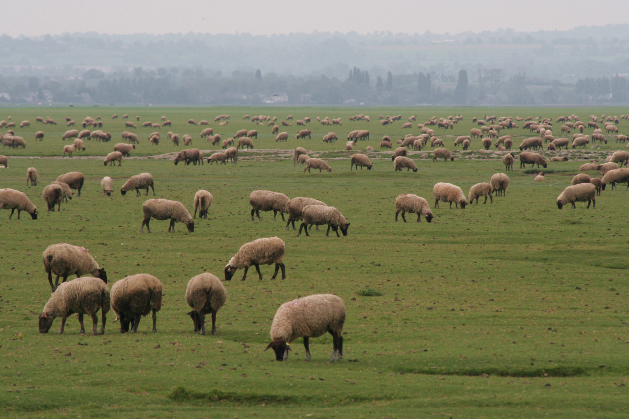 Moutons de pré-salé